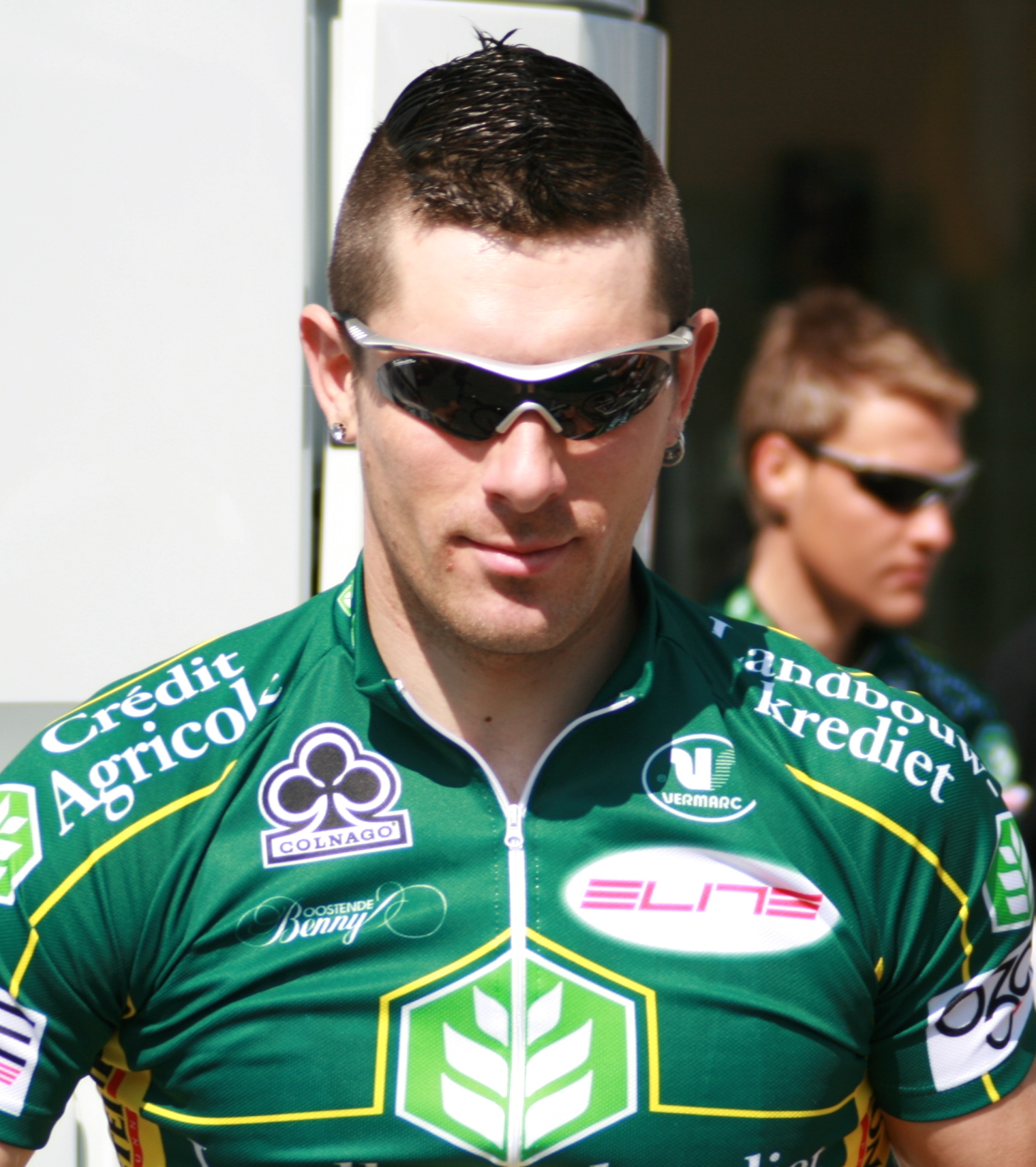 David Boucher aux Quatre jours de Dunkerque 2008